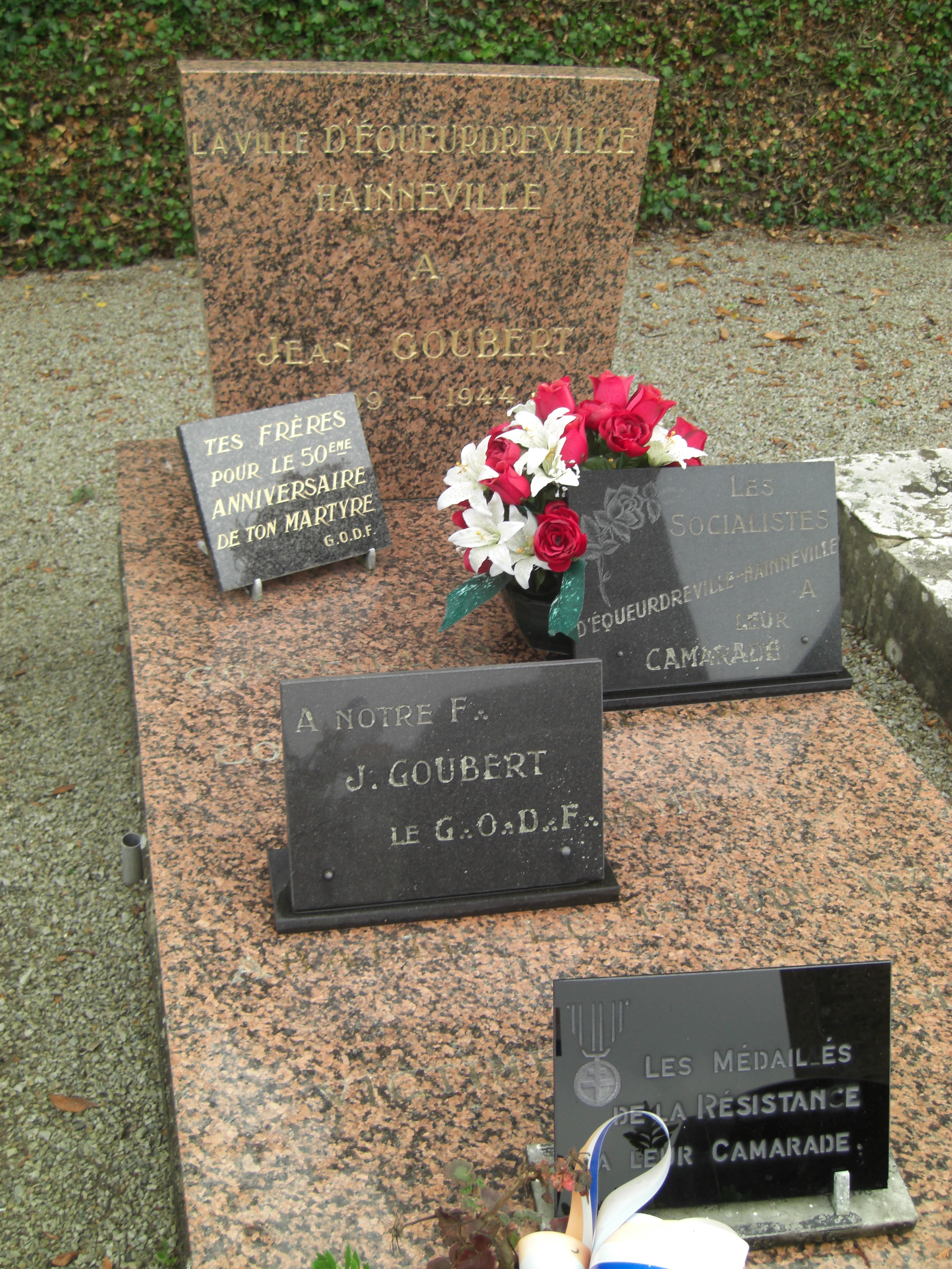 Jean Goubert était résistant à Saint-Germain-sur-Ay. Chef du réseau local de libération Nord, il fut assassiné par les allemands pour avoir planifié l'évasion de quatre parachutistes américains en 1944 au lendemain du débarquement.